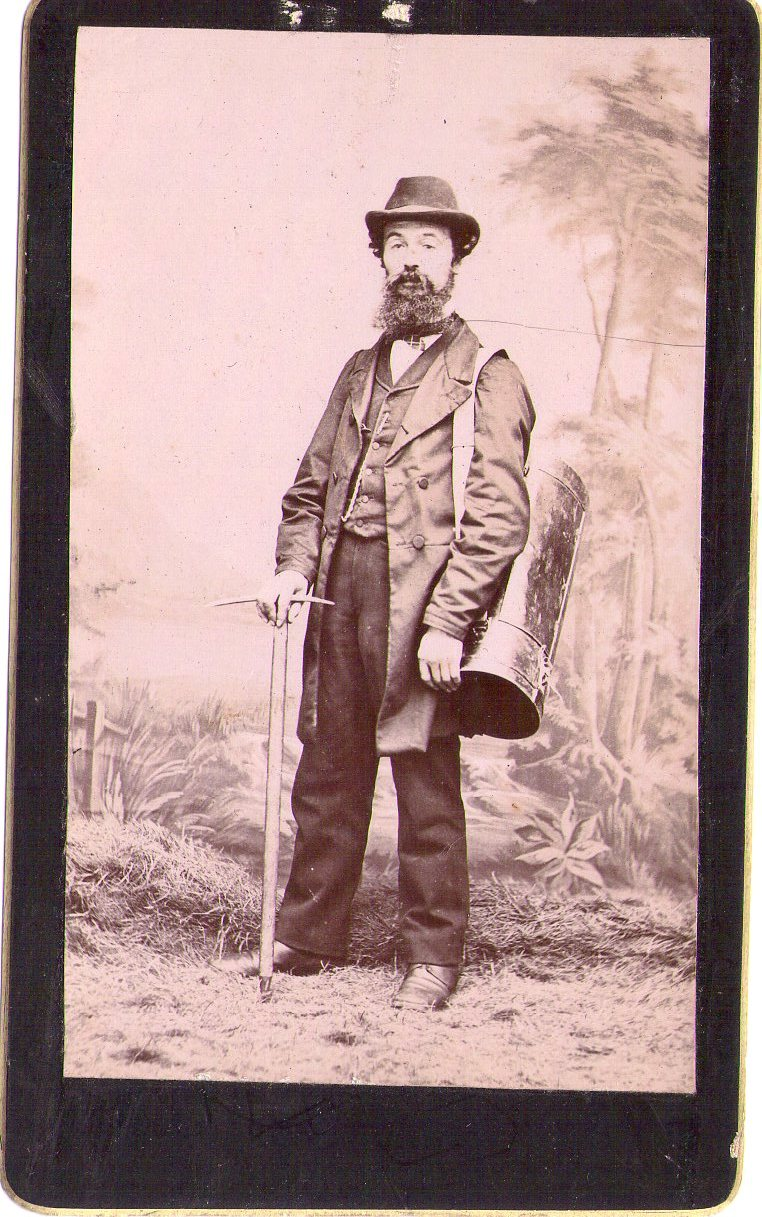 Photographie de Justin Paillot